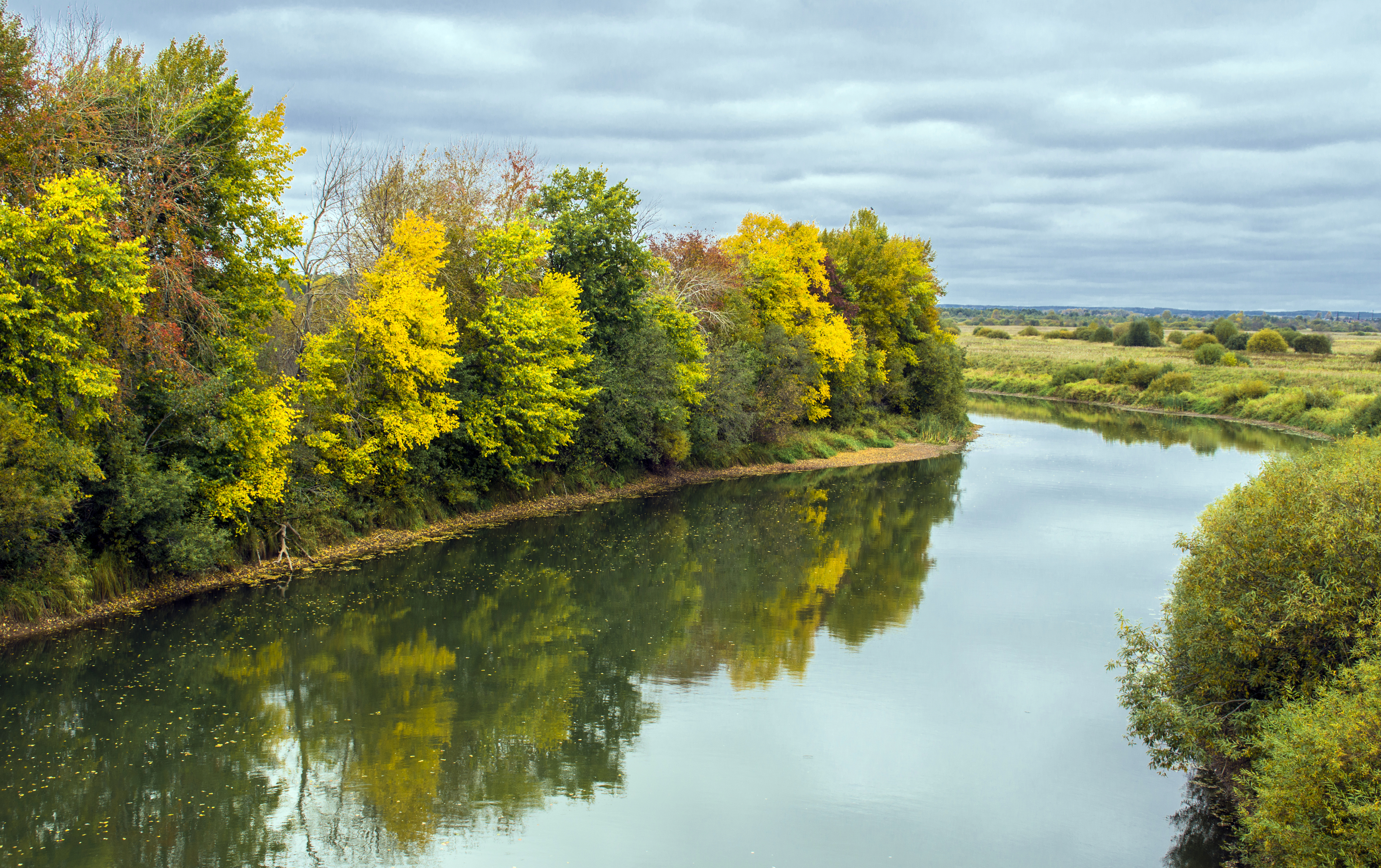 Река Коса в Зуевском районе This image has been uploaded for Wikivoyage travel guide on Кировская область